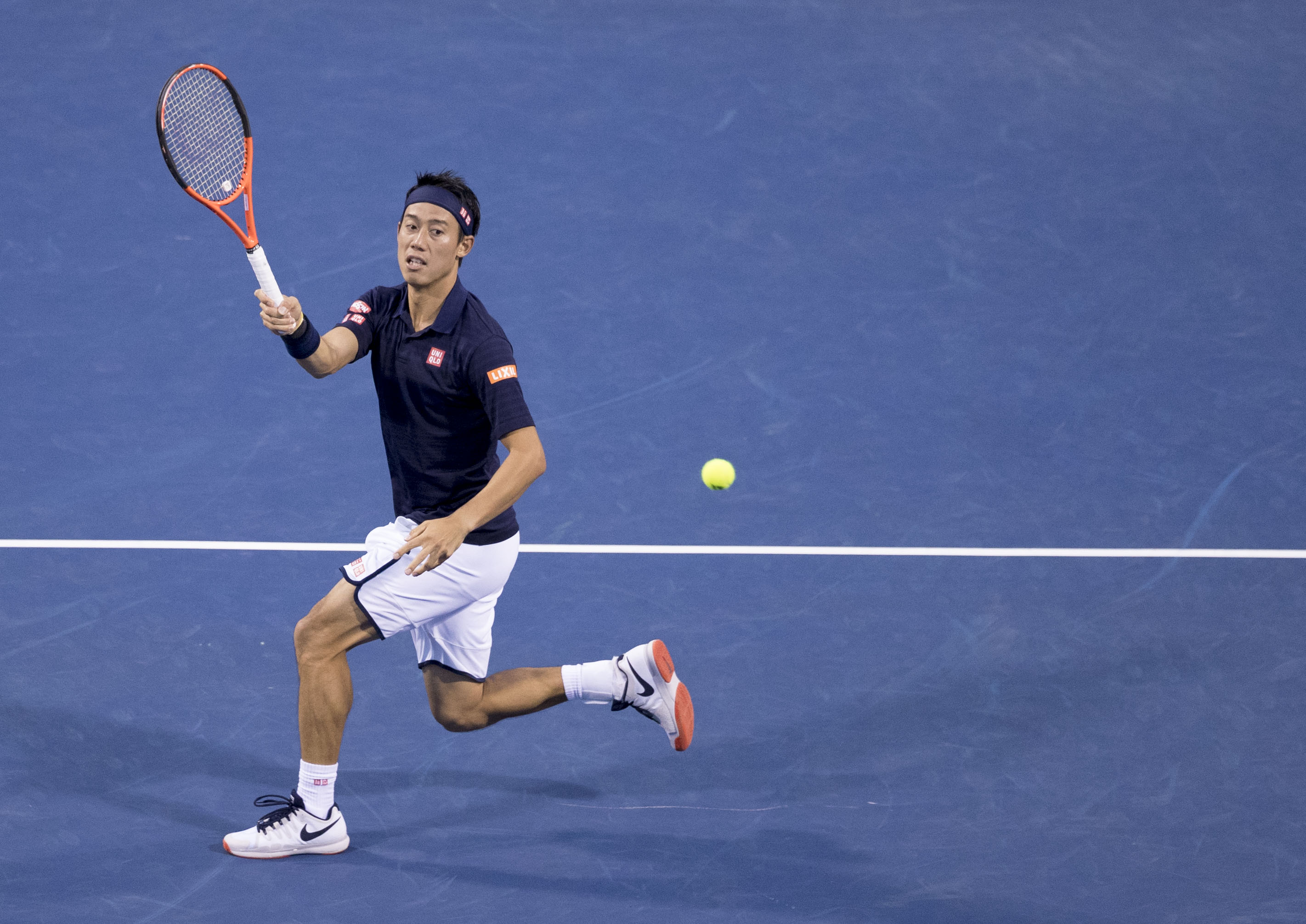 Citi Open Tennis 2017